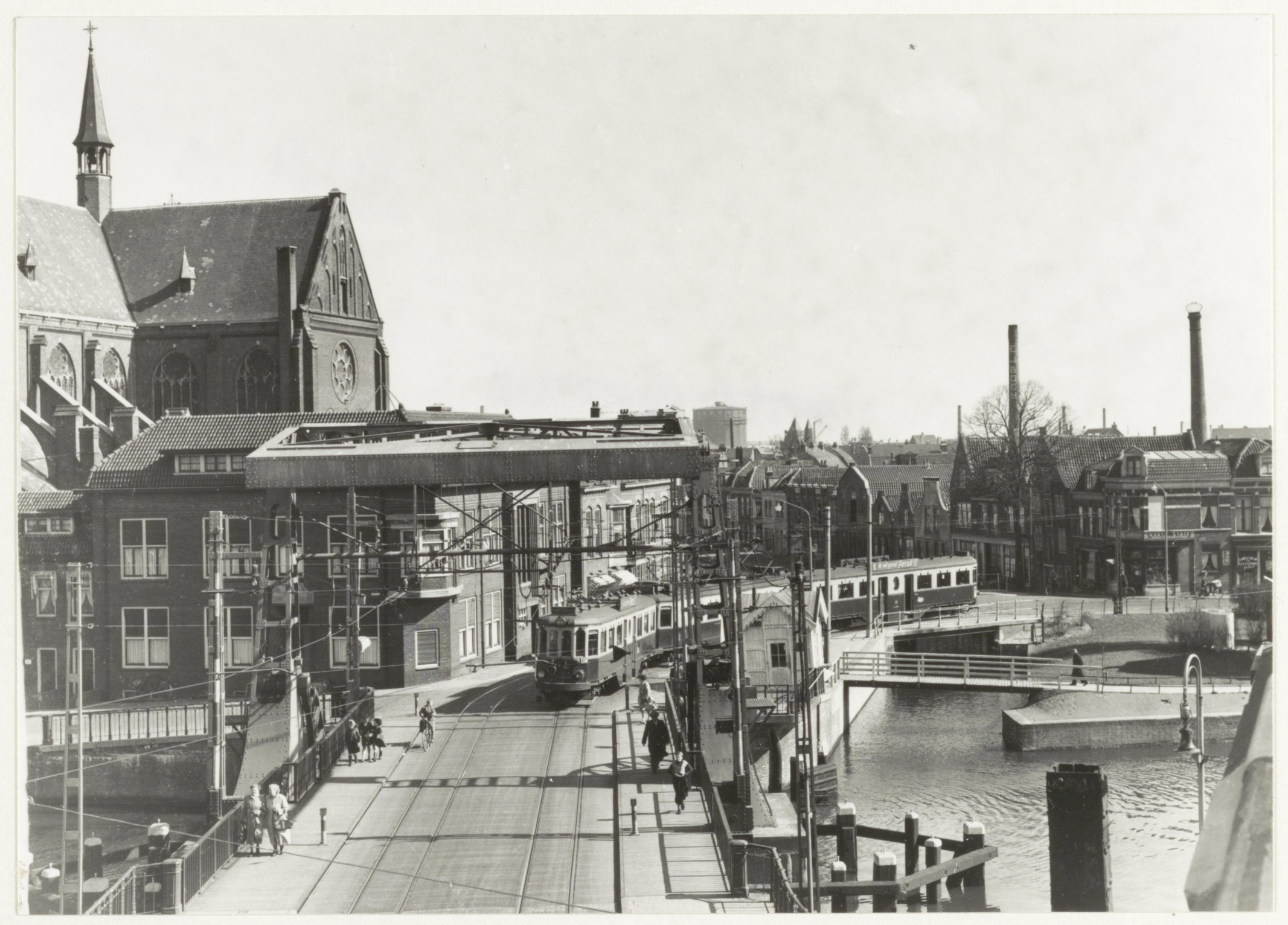 CollectieCollectie Fotoburo de BoerInventarisnummerNL-HlmNHA_54016826BeschrijvingBudapester stel van de NZH (blauwe tram) is net de Langebrug gepasseerd en rijdt via Antoniestraat richting Herensingel, op weg naar Amsterdam. Links is een deel van de Spaarnekerk te zien.FotonummerNL-HlmNHA_1478_3236DocumenttypeTopografische prenten, tekeningen en foto'sVervaardigerFotopersbureau de Boer, Boer, Cees de (1918-1985) Soort vervaardigerFotograaf AnnotatiesHD040986LandNederland ProvincieNoord-Holland GemeenteHaarlem PlaatsHaarlem StraatAntoniestraat GeografischBurgwalbuurt Begindatum1953Einddatum1953TechniekFoto Trefwoordenstraatgezichten, Bruggen, trams, openbaar vervoer